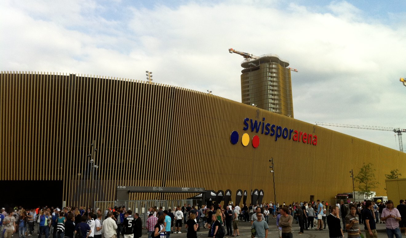 Aussenansicht der Swissporarena